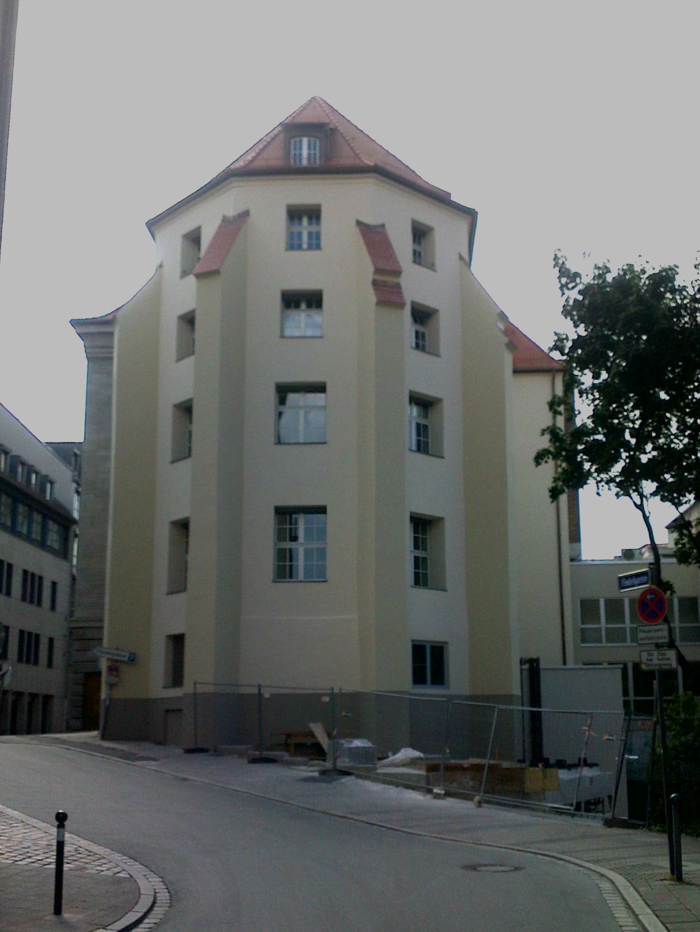 Franziskanerkirche Nürnberg - ehemalige Kirche des Franziskanerklosters - Nordseite - Überreste in der Findelgasse